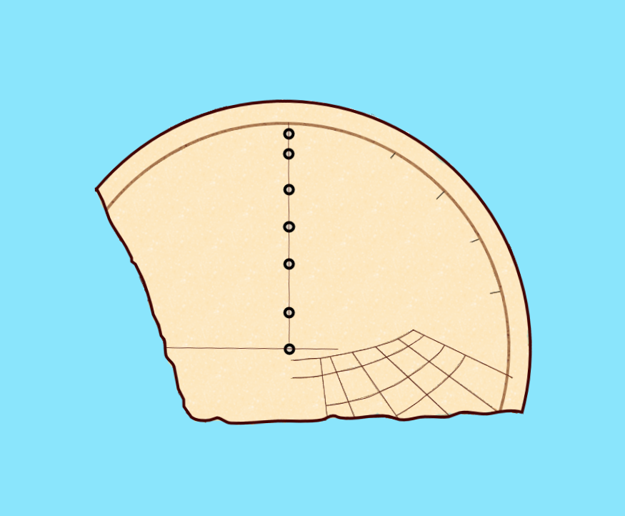 Fragment du cadran disque de Ponteilla, dessin d'après un tracé de Jérôme Bonnin.